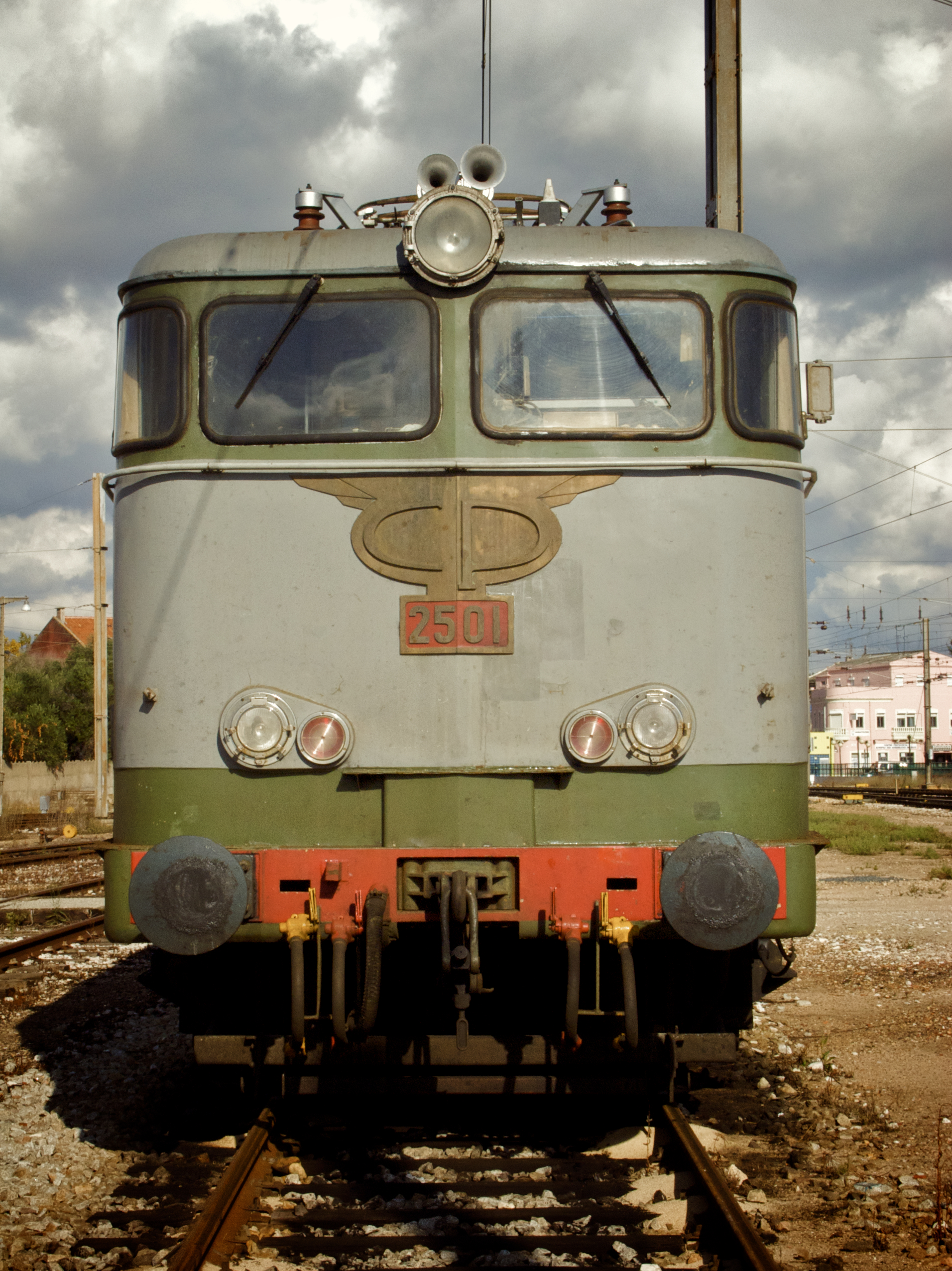 Local: Estação do Entroncamento [Linha do Norte, PK 106] Data e hora: 1 de Novembro de 2008 [13h56] Material: Locomotiva 2501 [Groupement 50 Hz] esta fotografia foi utilizada, mas não devidamente creditada, pela Fundação Museu Nacional Ferroviário.